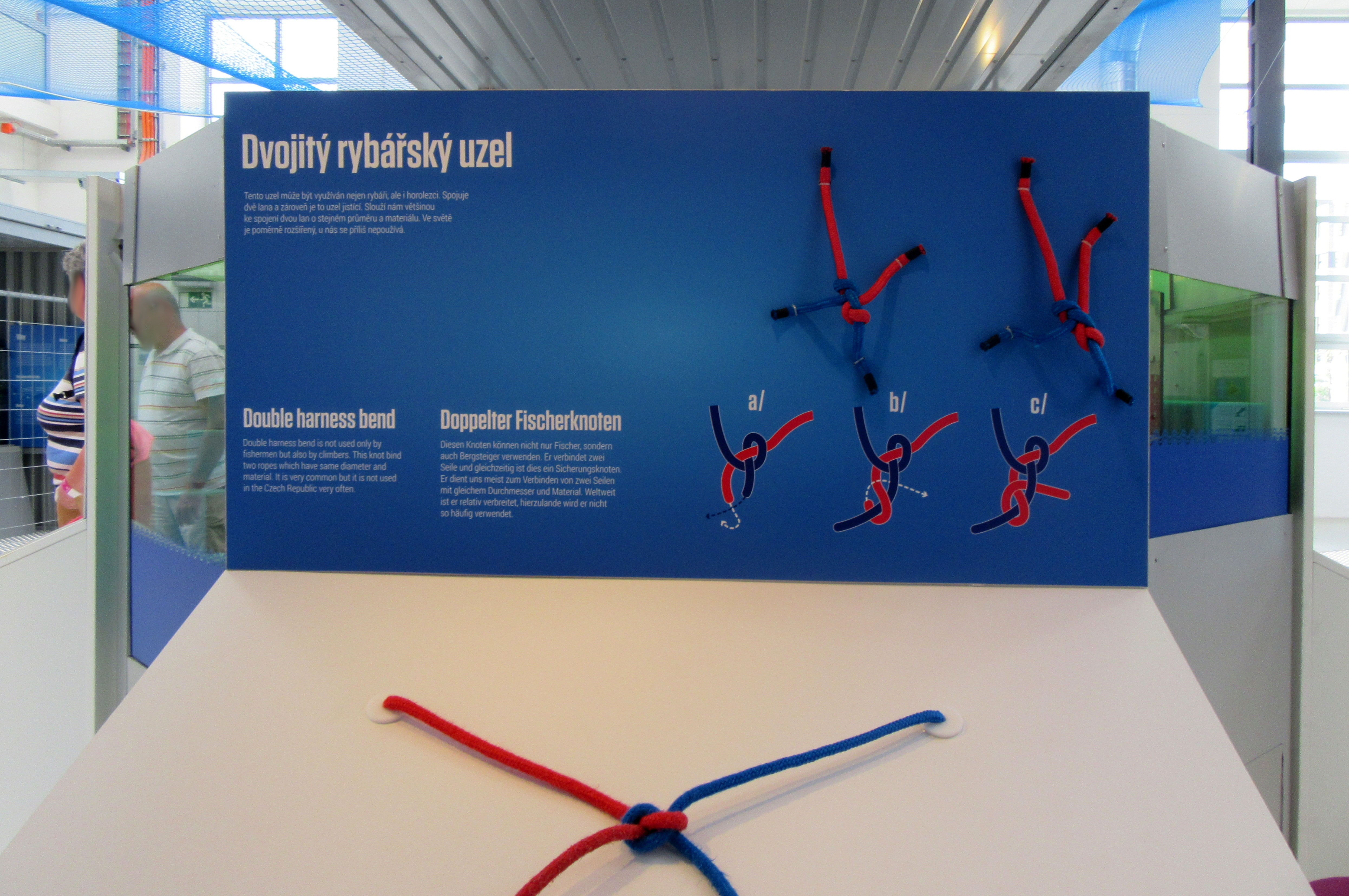 Dvojitý rybářský uzel v Techmanii v Plzni.